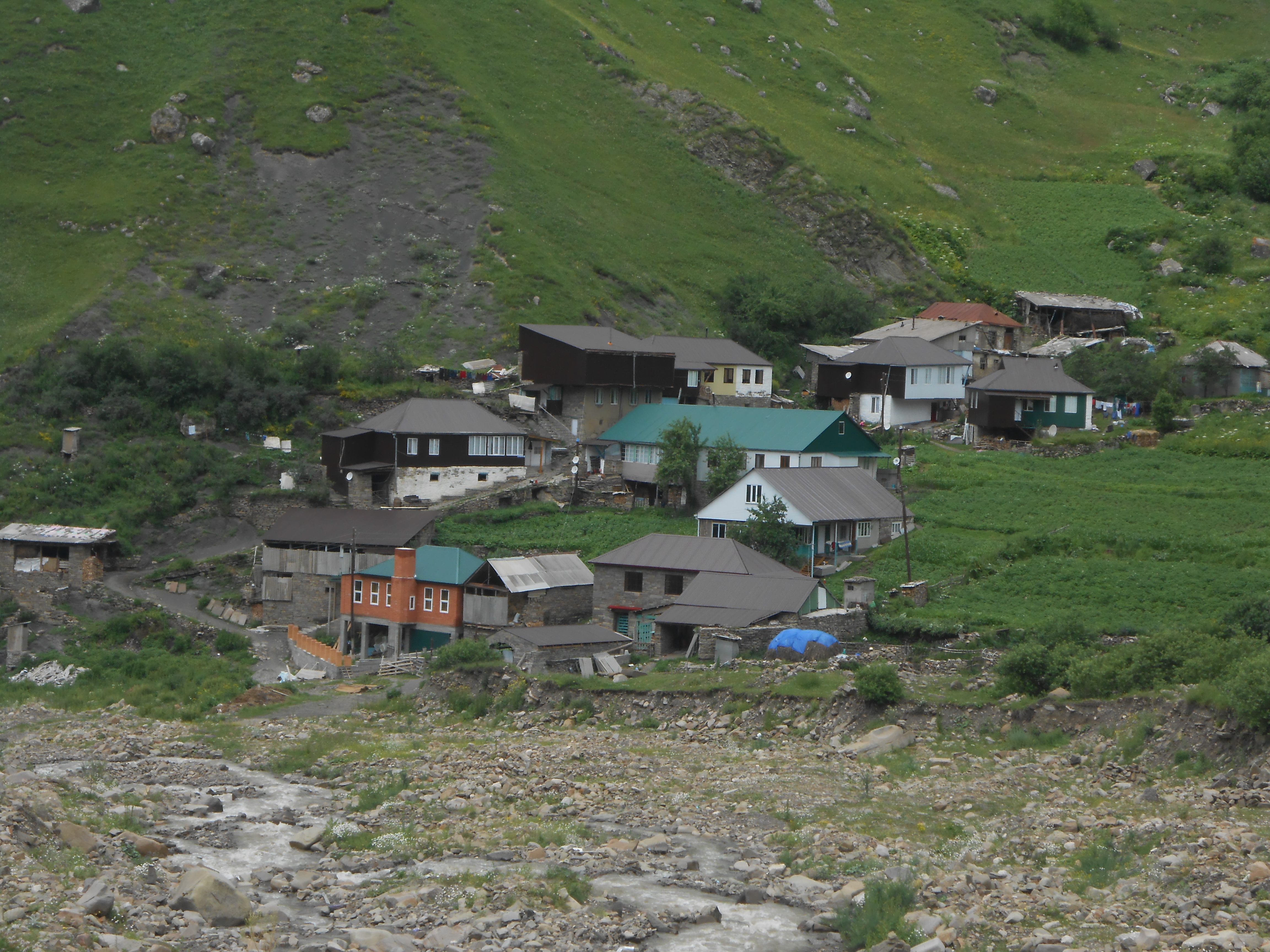 Село Кенхи, Шаройский р-н, респ. Чечня